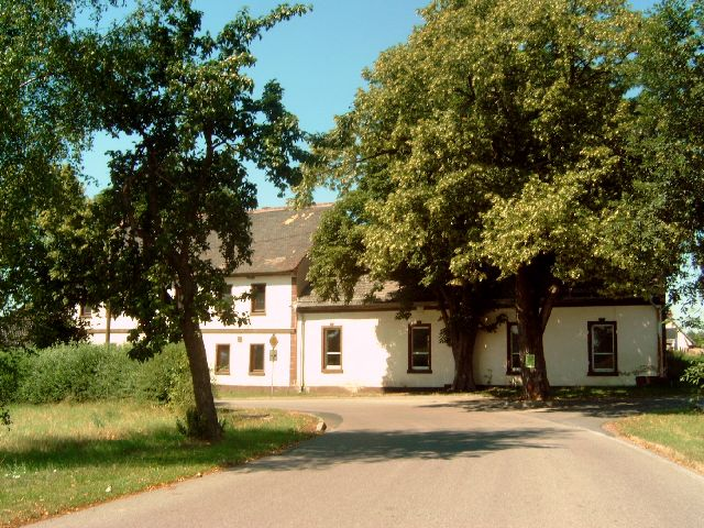 Alter Gasthof in Gostau Urheber: selbst erstellt